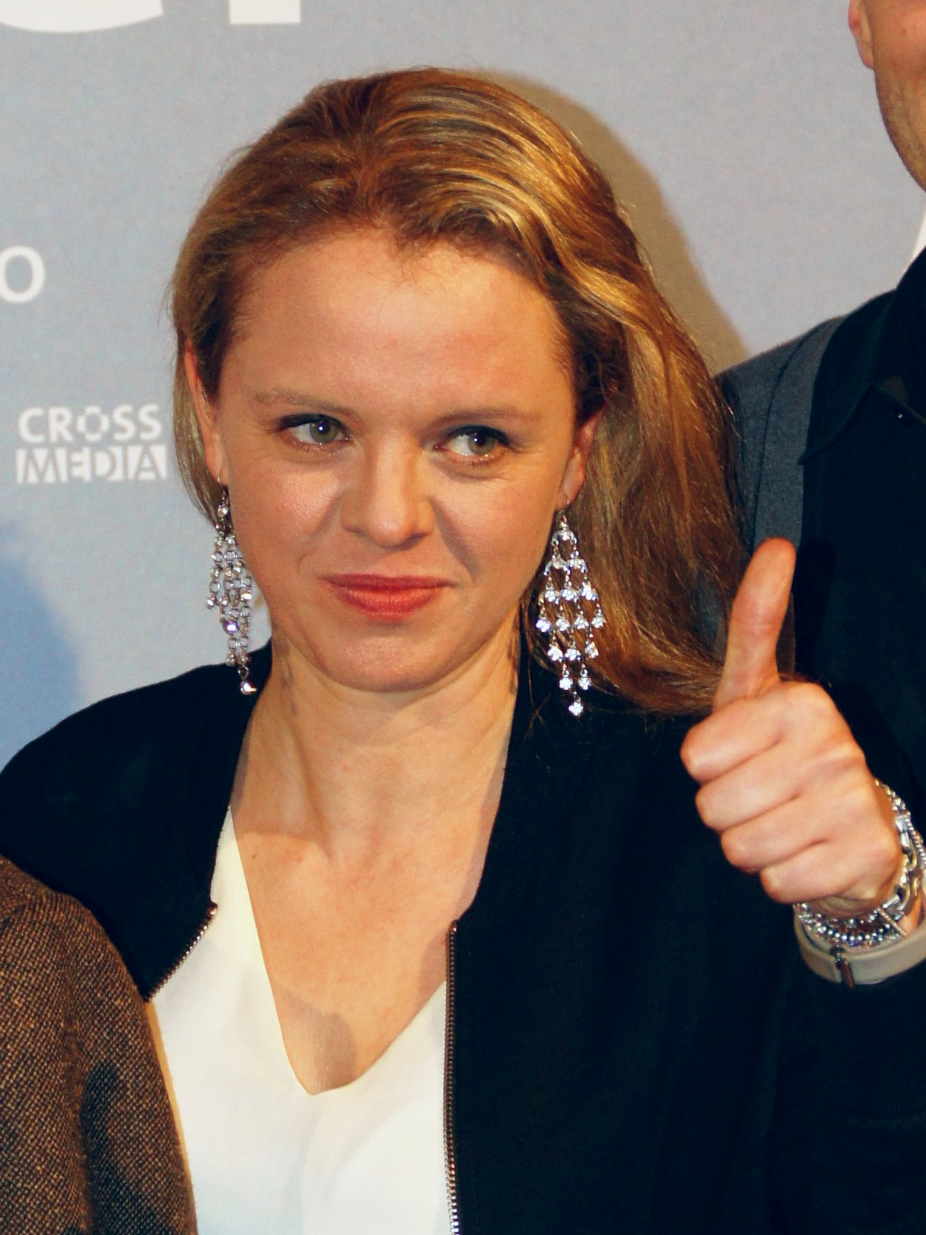 Julia von Heinz bei der Premiere von "Katharina Luther", Februar 2017, Berlin